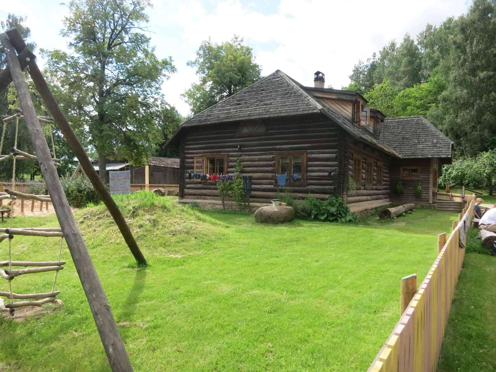 Rosma koolimaja